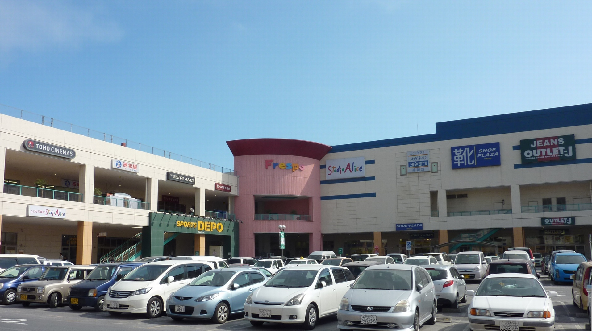 鹿児島市与次郎のフレスポジャングルパーク。TOHOシネマズ与次郎、ニシムタ食彩館、サードプラネットなどが入居している。